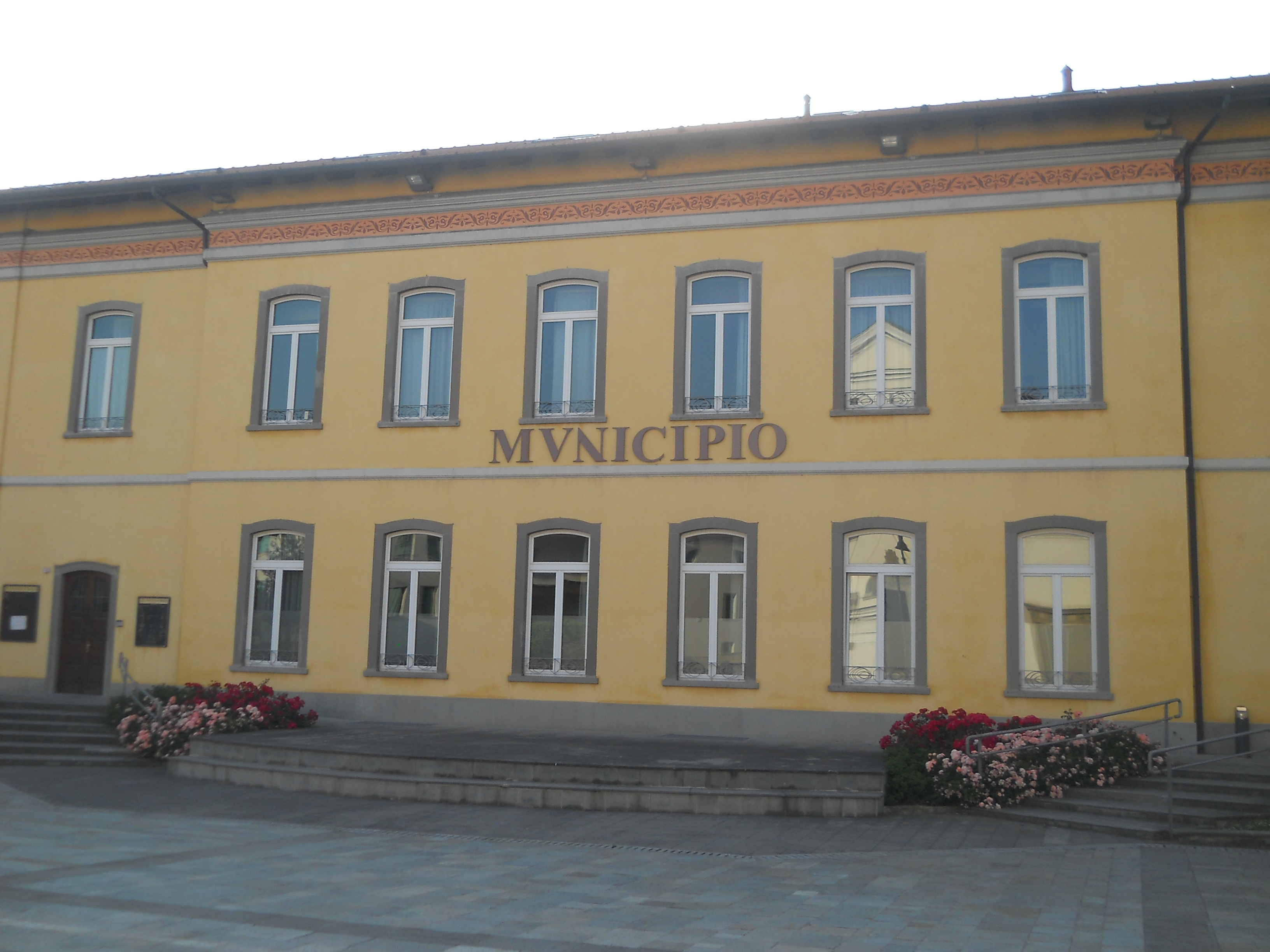 Sede del municipio di Capriolo